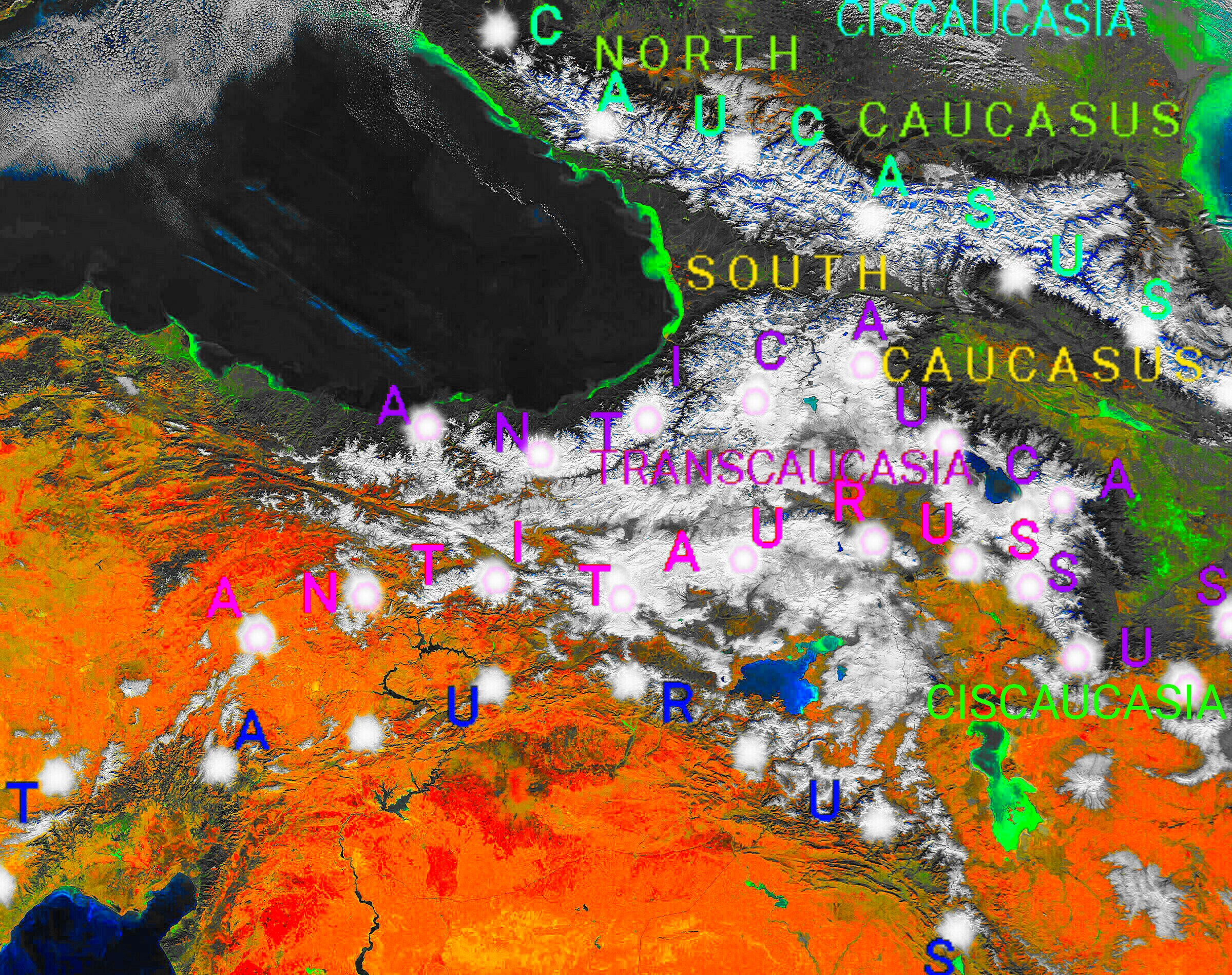 Modified NASA image of Caucasus mountains and Armenian highland